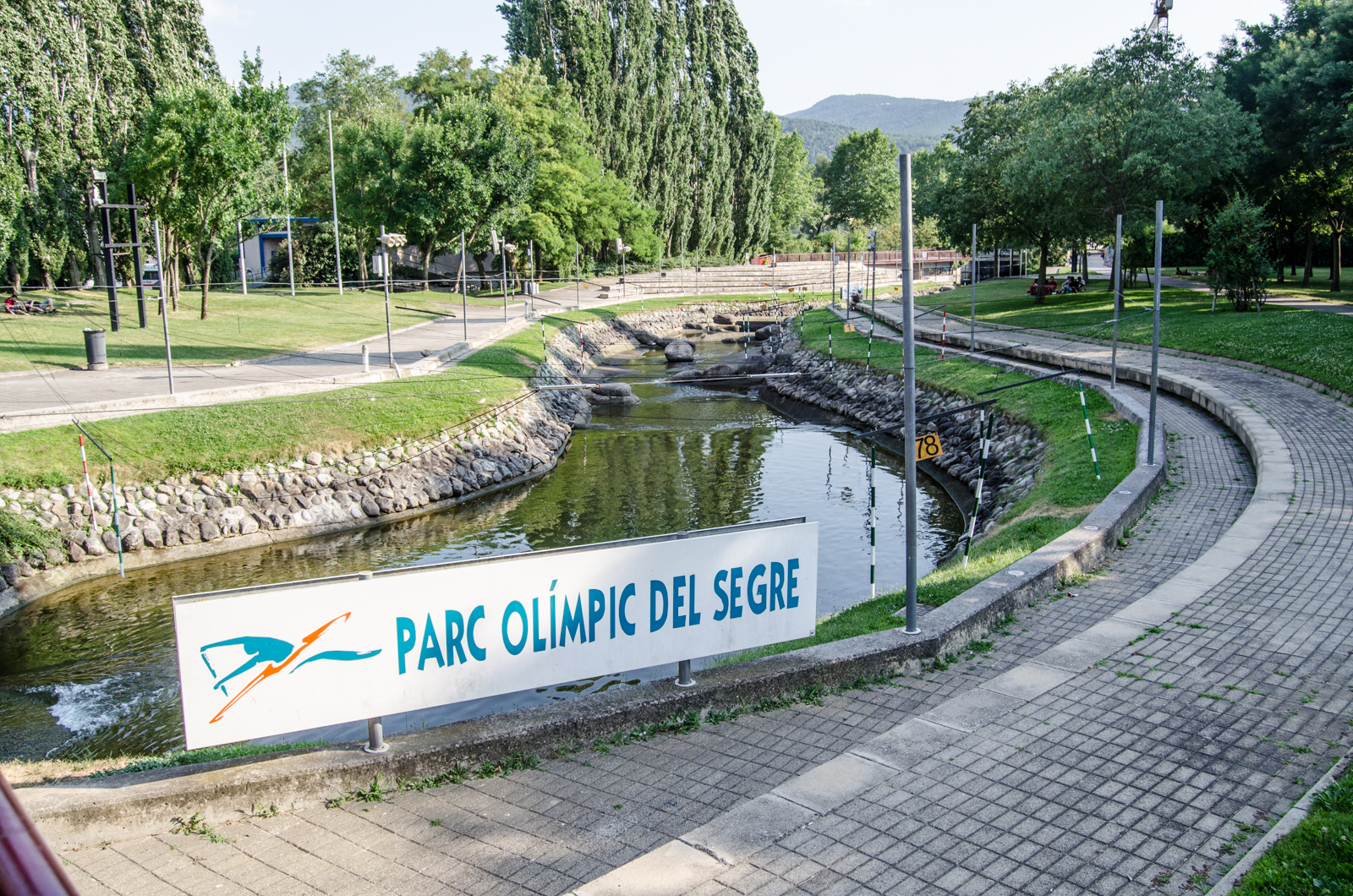 Parque Olímpico del Segre. Seo de Urgel (Lérida - España). Panel junto al canal de aguas bravas.